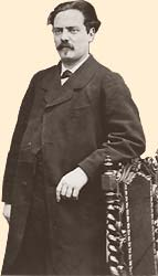 Ernest Cognacq Domaine public